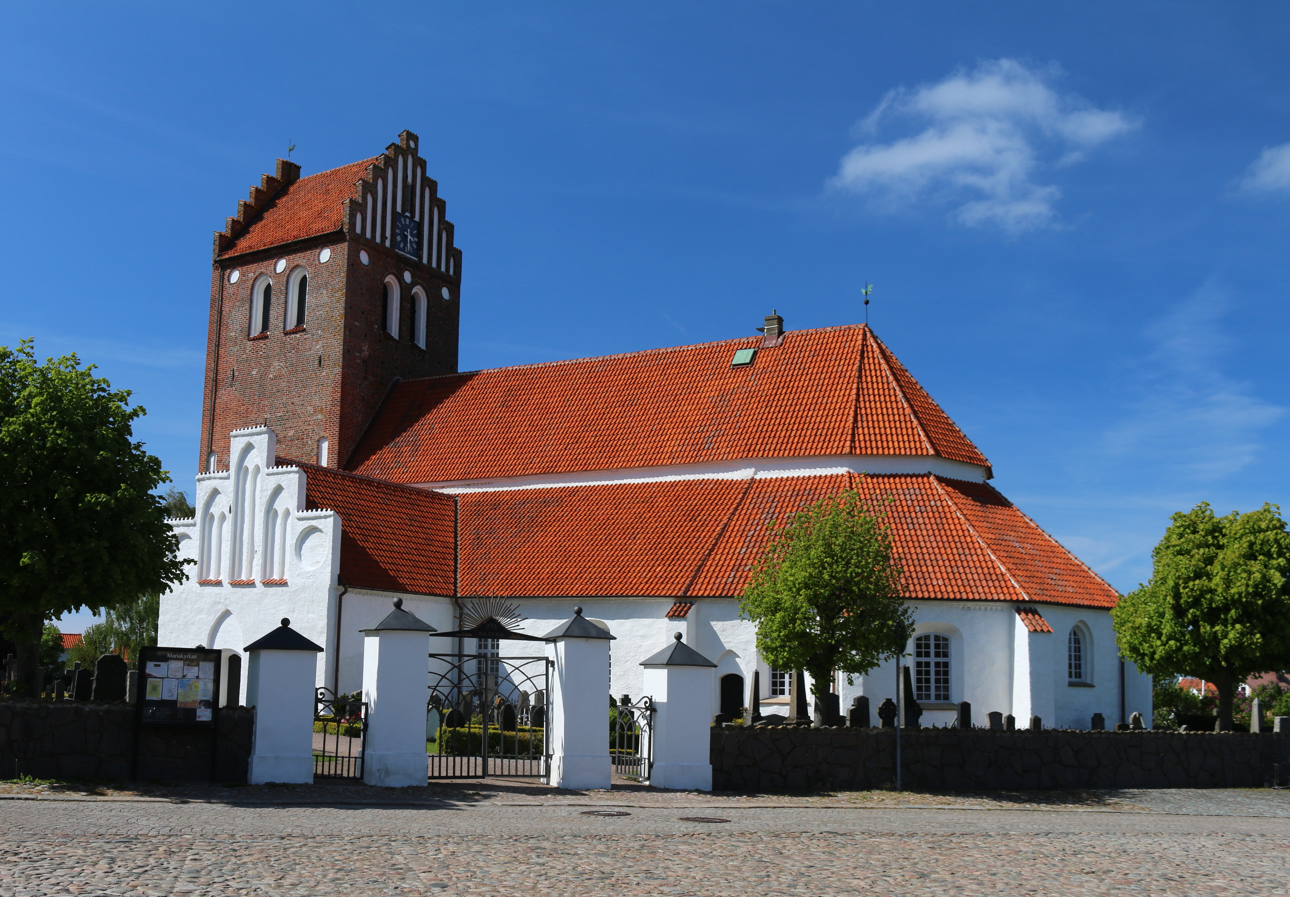 Mariakyrkan i Båstad